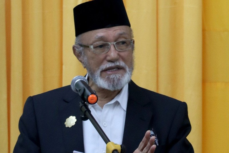 Wali Nanggroe Aceh & Mantan Perdana Menteri GAM